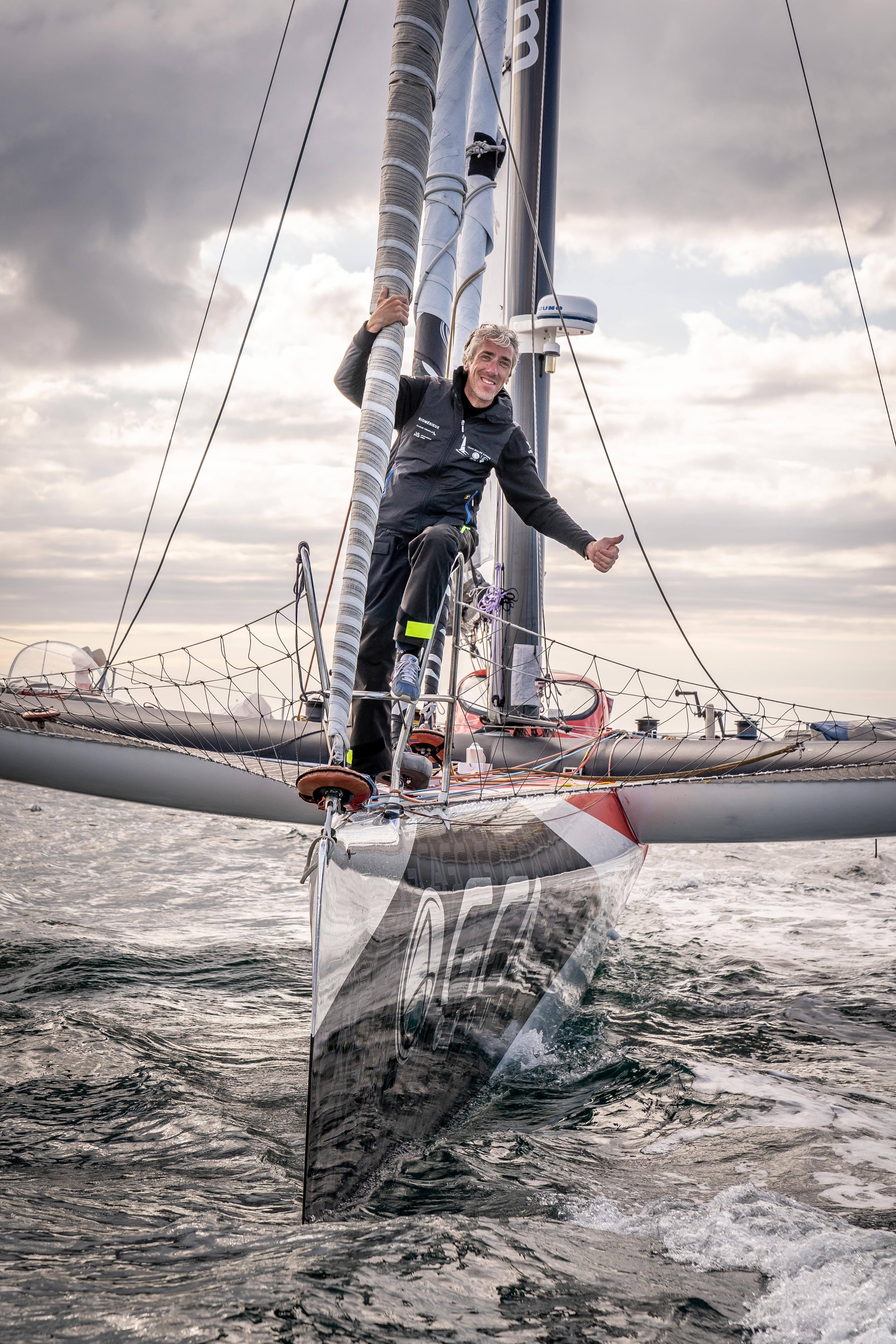 Gilles Lamiré sur son Multi 50